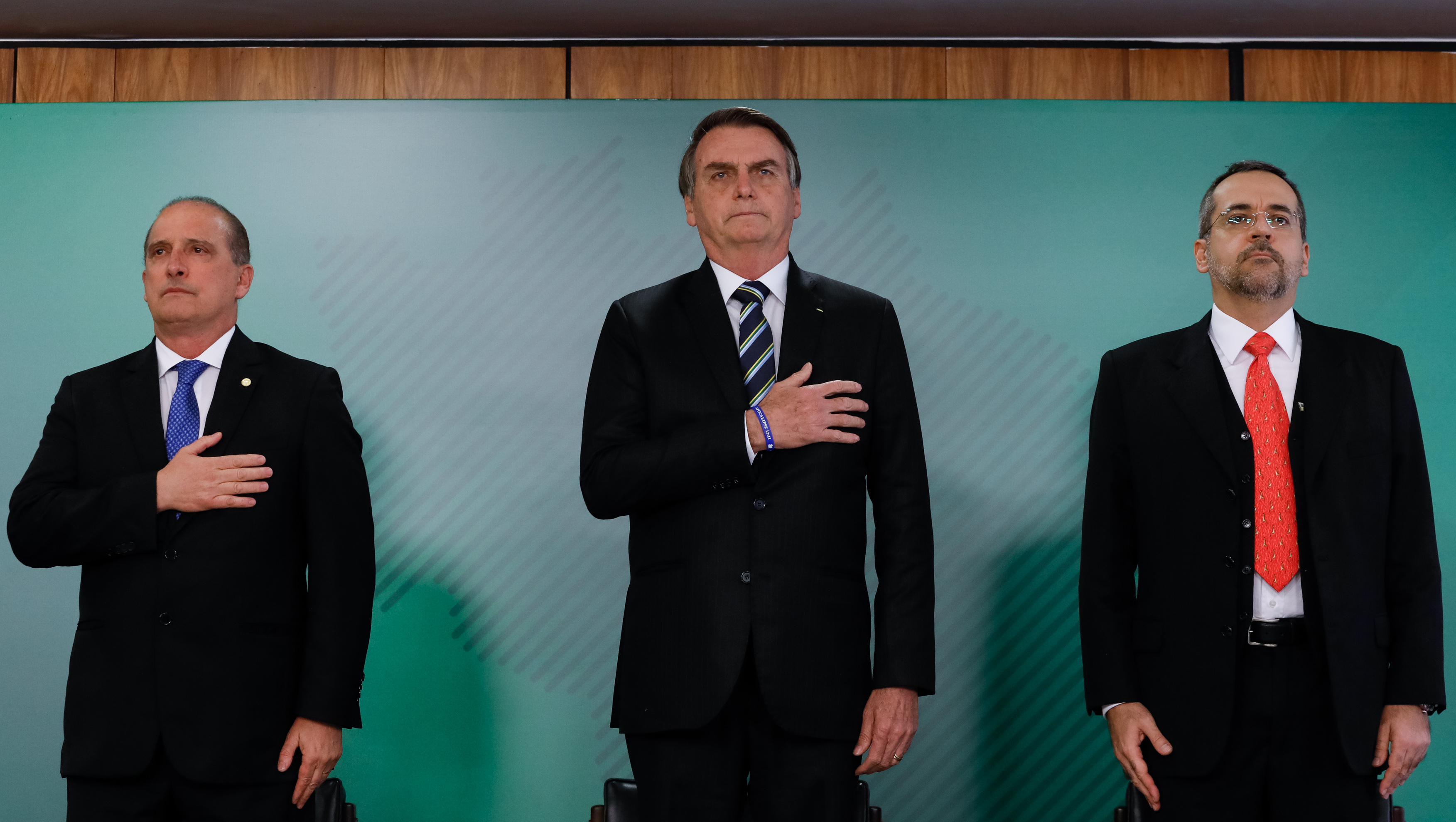 (Brasília - DF, 09/04/2019) Execução do Hino Nacional Brasileiro. Foto: Carolina Antunes/PR